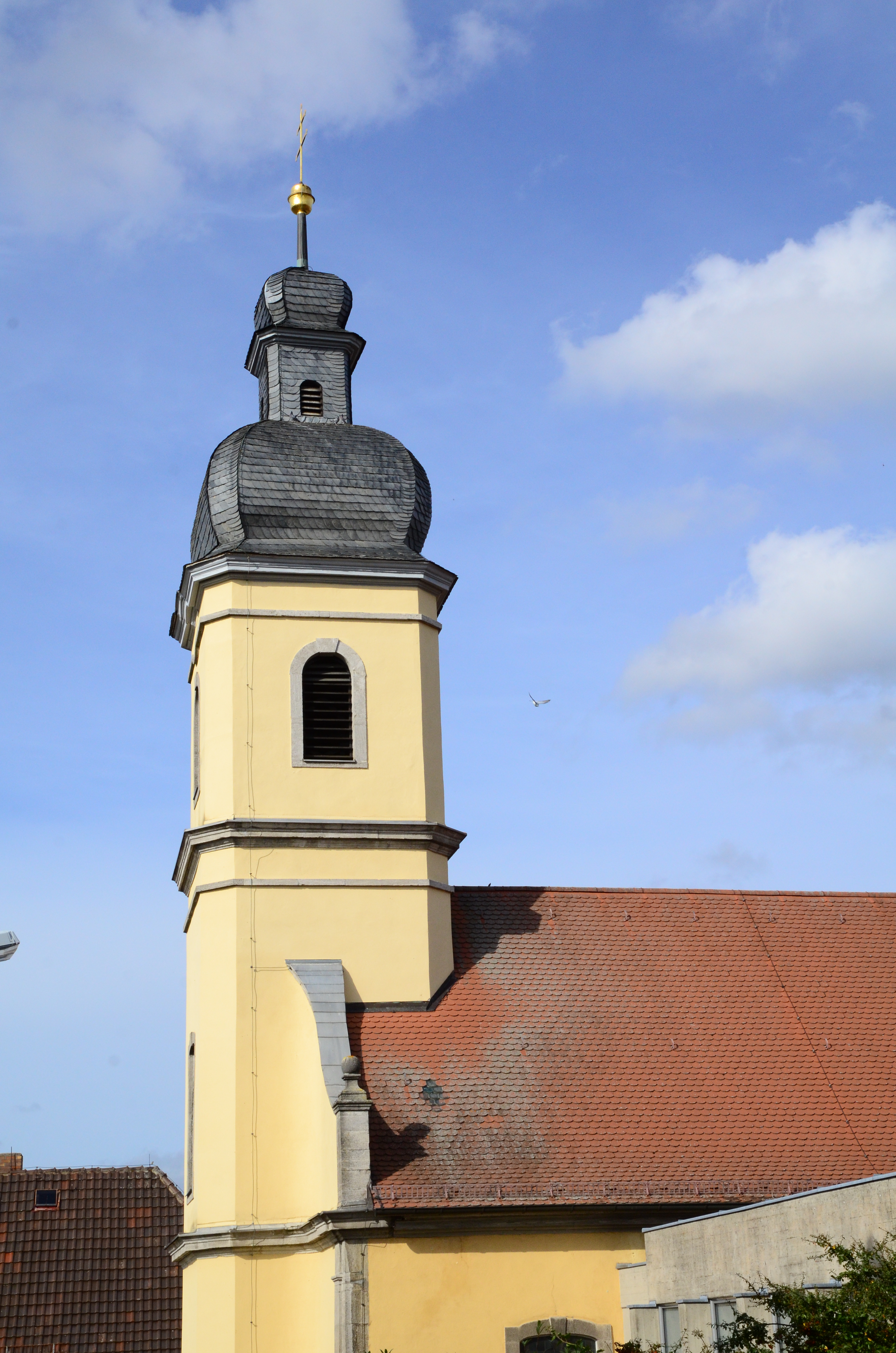 kath. Pfarrkirche St. Martin in Kleinrinderfeld